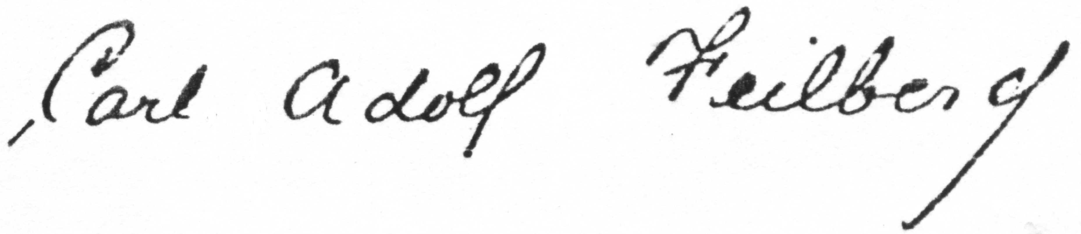 signature